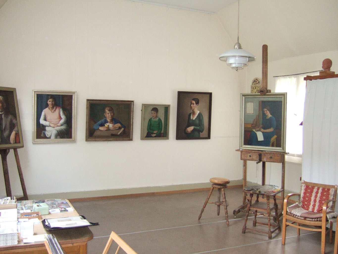 Malraum des Ateliers (Teilansicht) der Kunststiftung Paul Kälberer, Glatt (Sulz am Neckar)